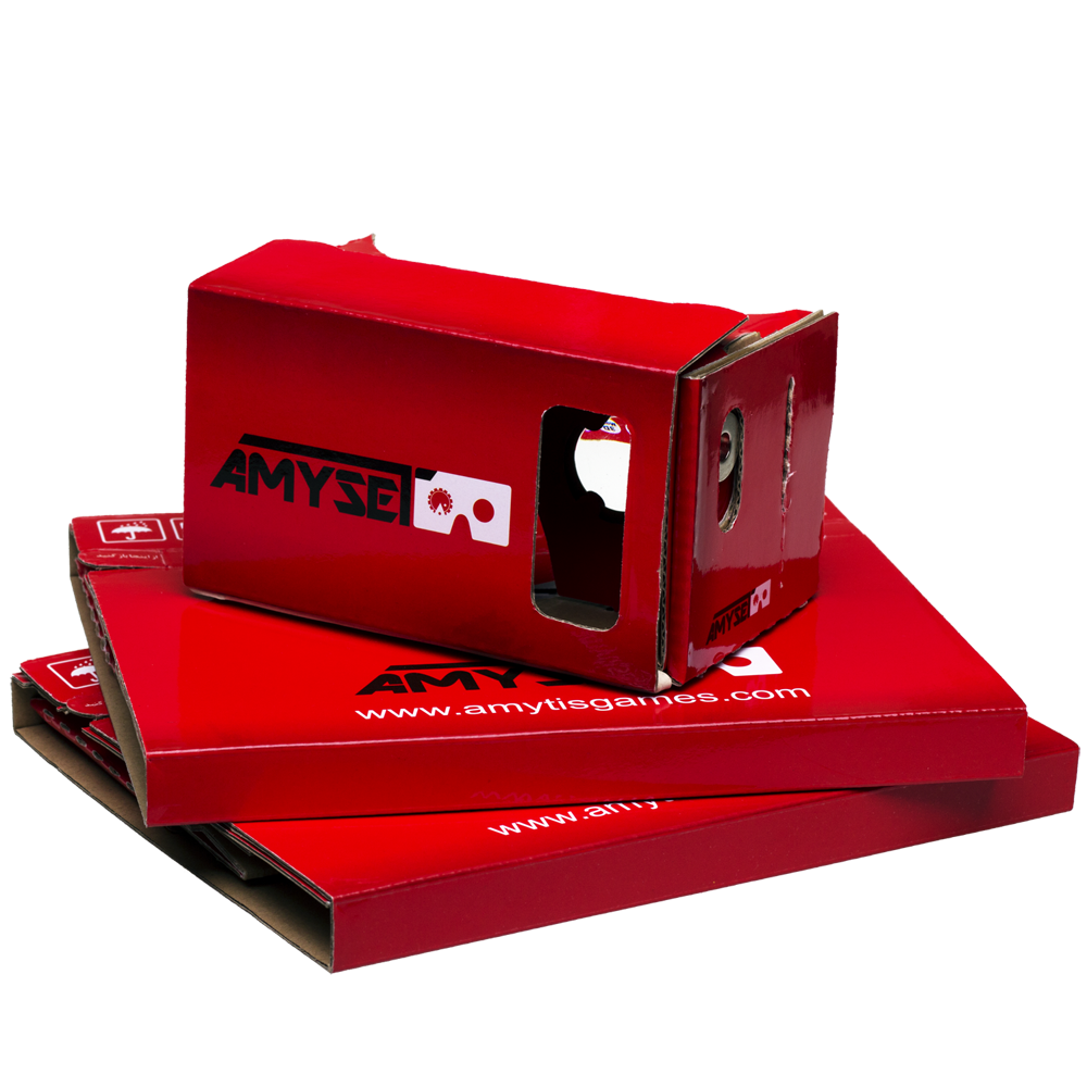 هدست و عینک واقعیت مجازی و واقعیت افزوده آمی سِت (amyset)